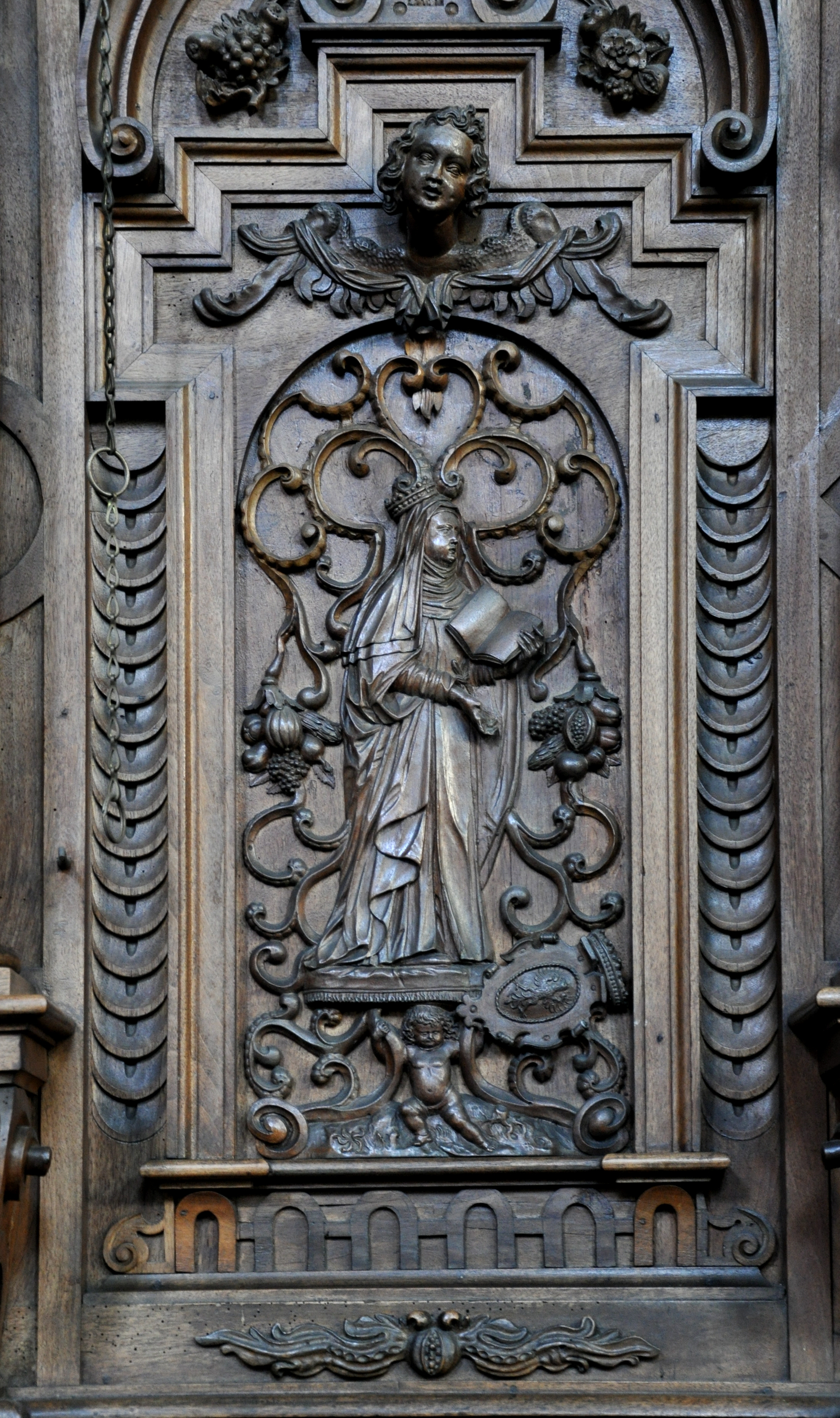 Chorgestühl (1635) der ehem. Klosterkirche Weißenau, Ravensburg; links (Nord), Dorsalfeld: Kaiserin Adelheid